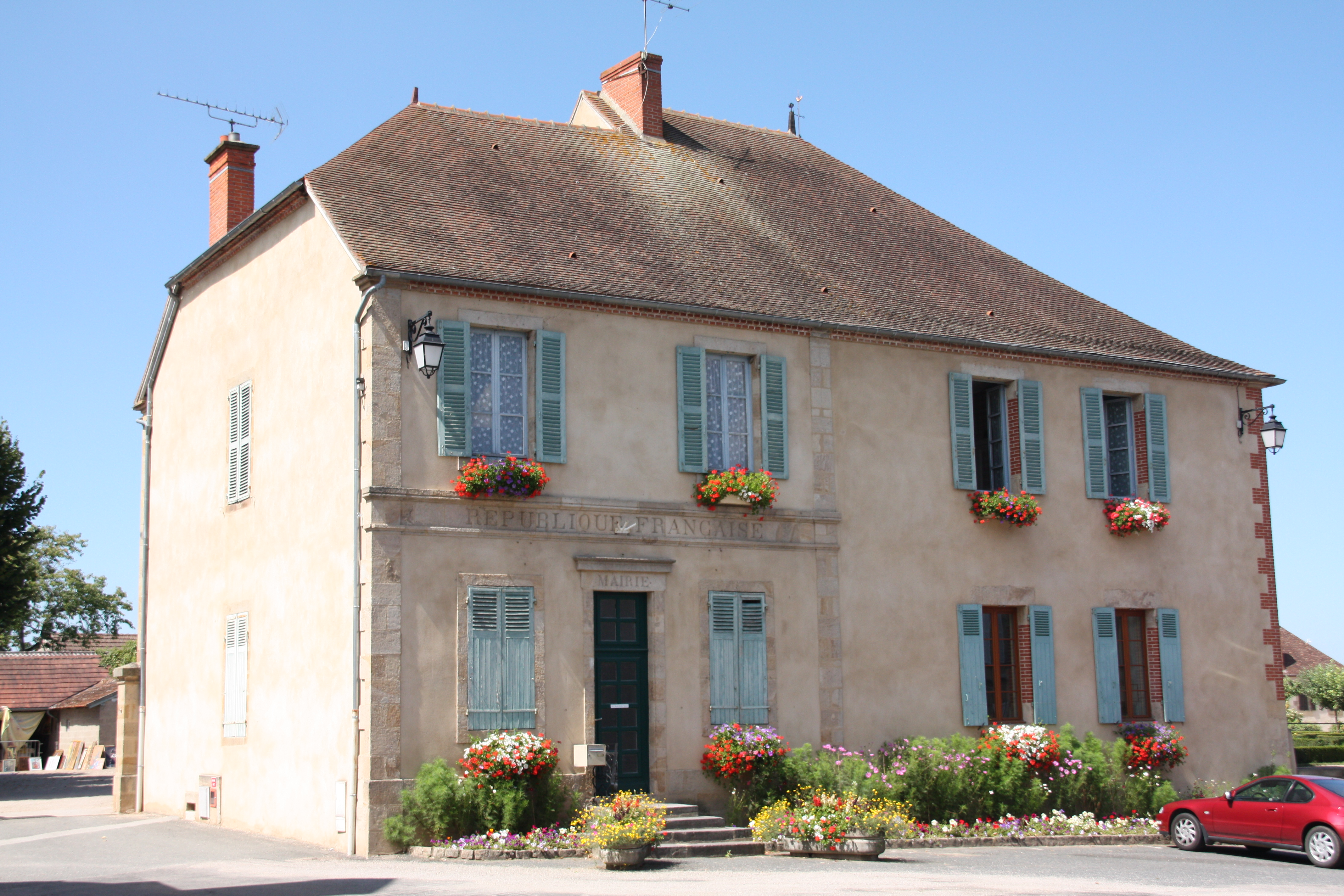 Saint-Menoux, Allier, France